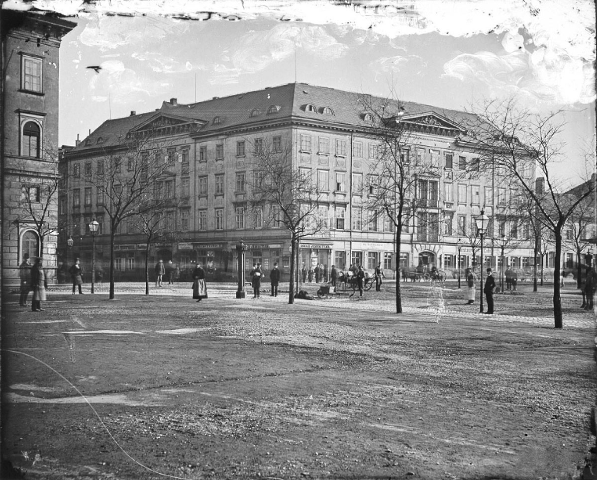 Grimmaischer Steinweg 2/Augustusplatz 2 in Leipzig. 1821 ließ Benedictus Gotthelf Teubner das Teubners Haus mit der „Papierhandlung Ferdinand Flinsch“ errichten. Es war der erste repräsentative Neubau am späteren Augustusplatz, Ecke Grimmaischer Steinweg, direkt gegenüber der Universitätskirche. Teubners Haus Augustusplatz 2 wurde 1880 durch einen Neubau ersetzt.